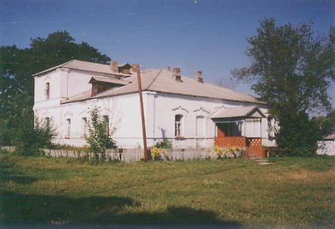 Будинок художниці Л.І.Чарниш, фото, 1996 Автор Кожевнікова О.М.